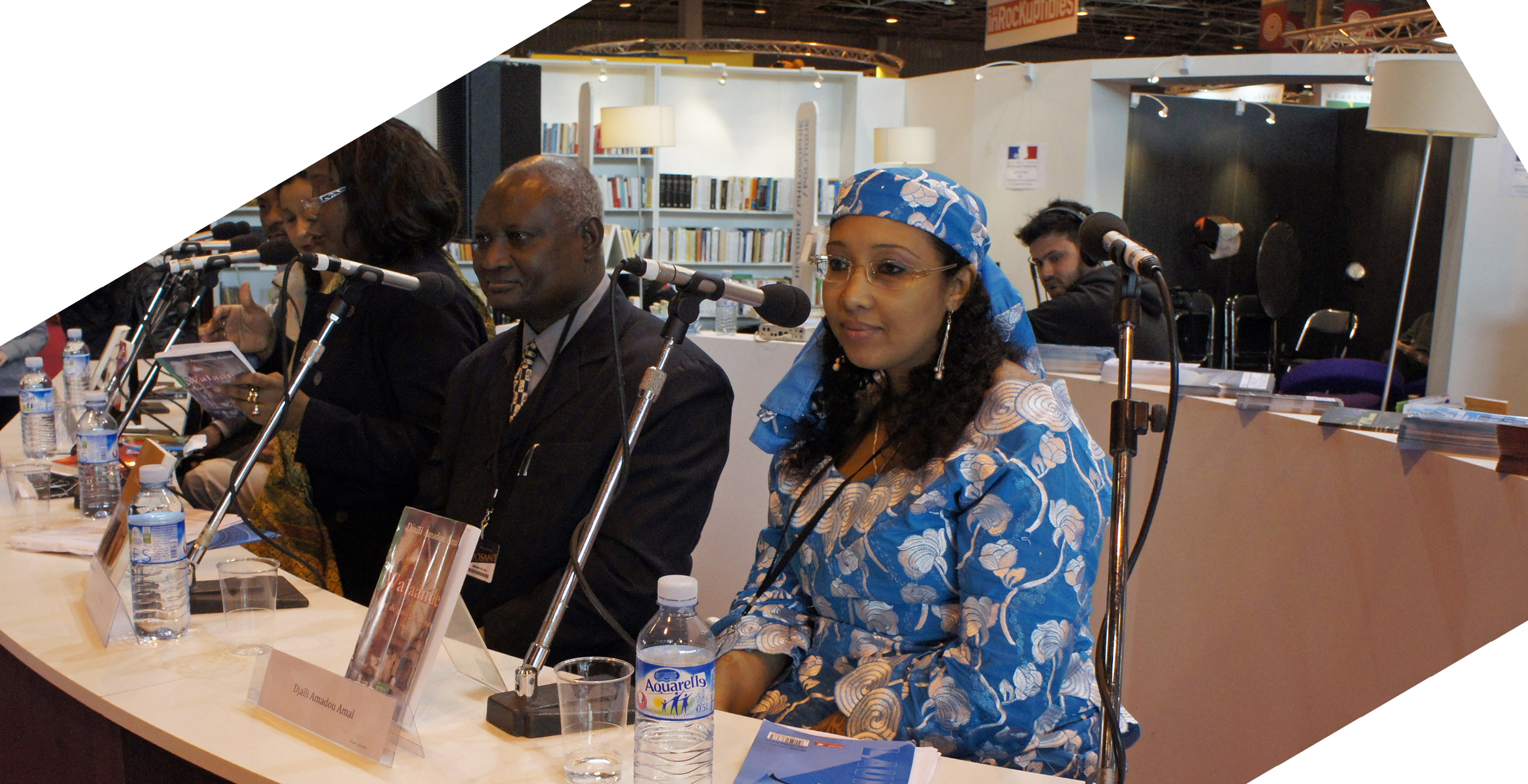 Djaïli Amadou Amal au salon du livre 2012 et Amadou Idé.